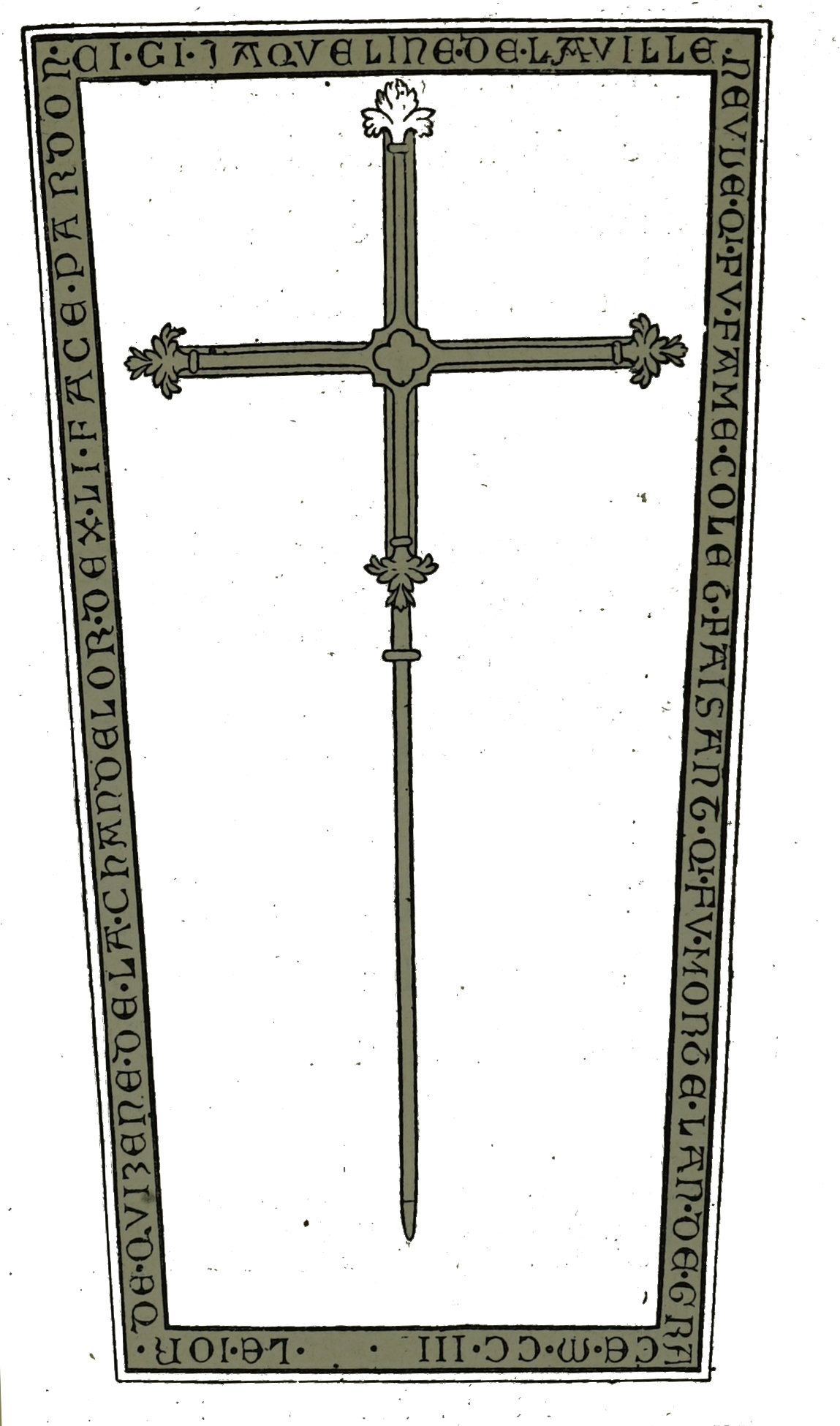 par un dessin de Fichot.